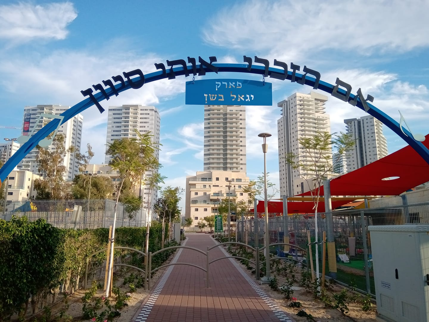 פארק על שם יגאל בשן, 2019